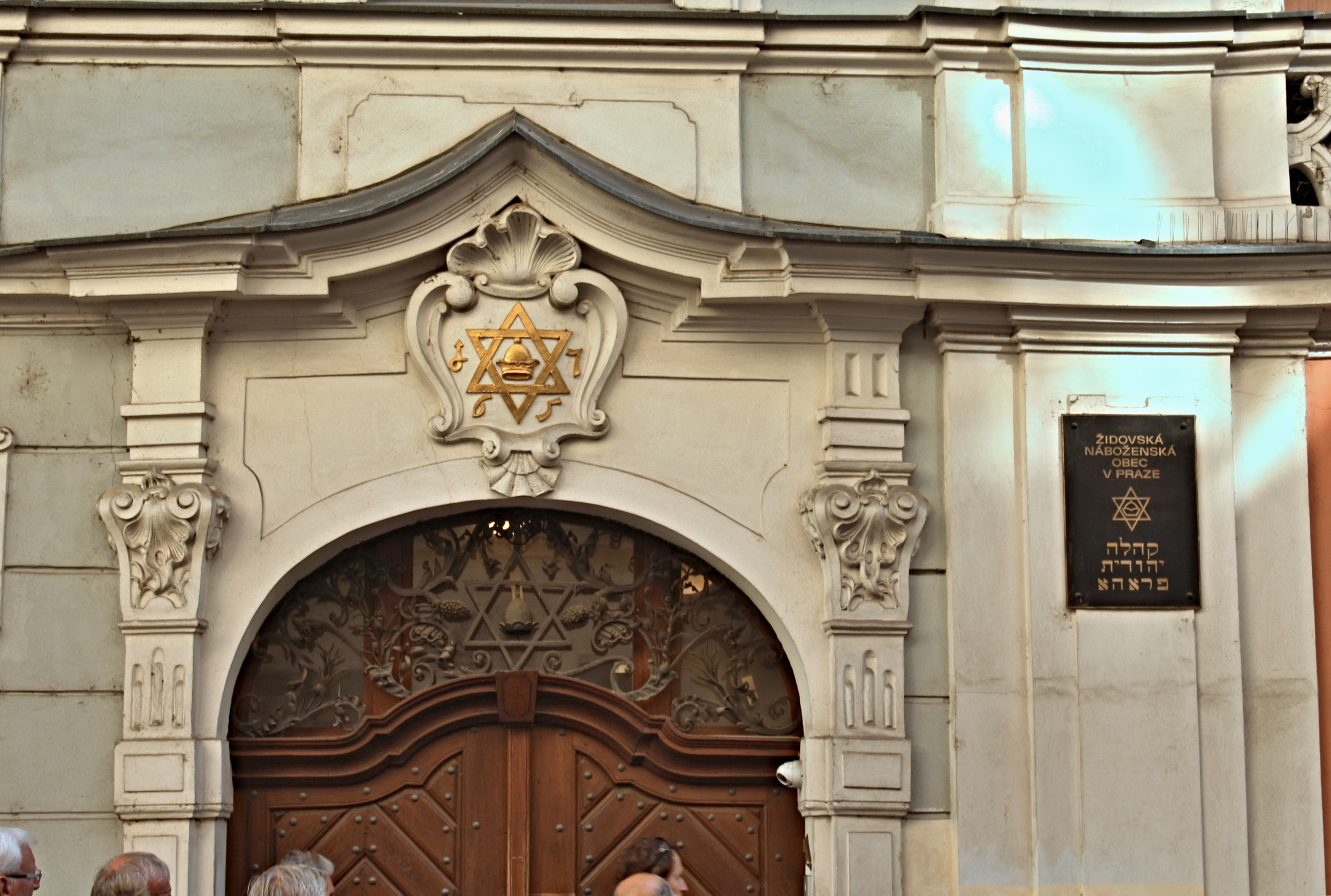 Praha 1-Josefov, židovská radnice